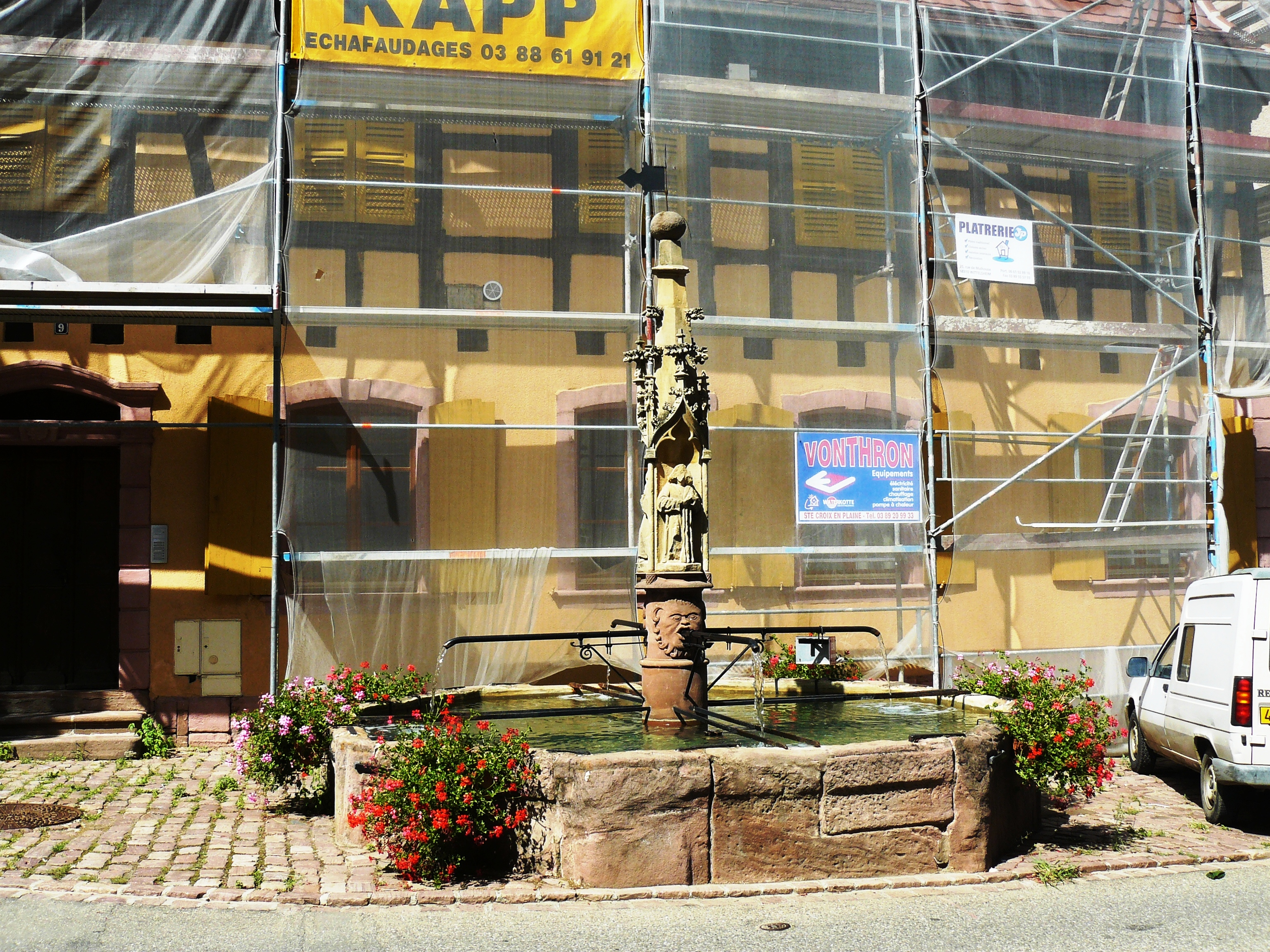 Fontaine Saint-Nicolas (XVIe siècle)